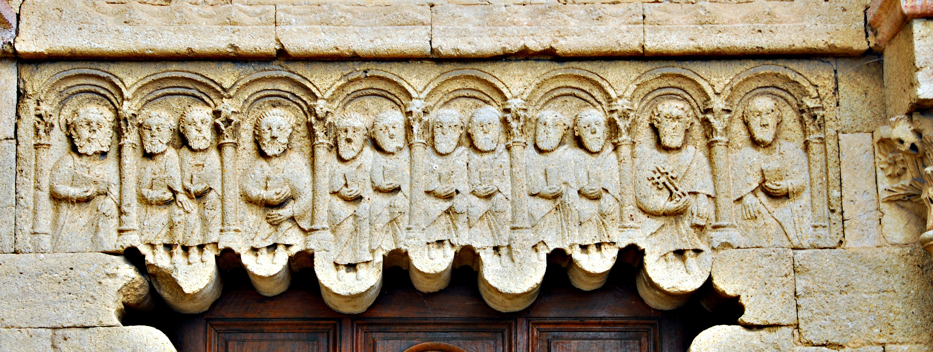 Prieuré de Ganagobie, Hauptpor6tal, Türsturz